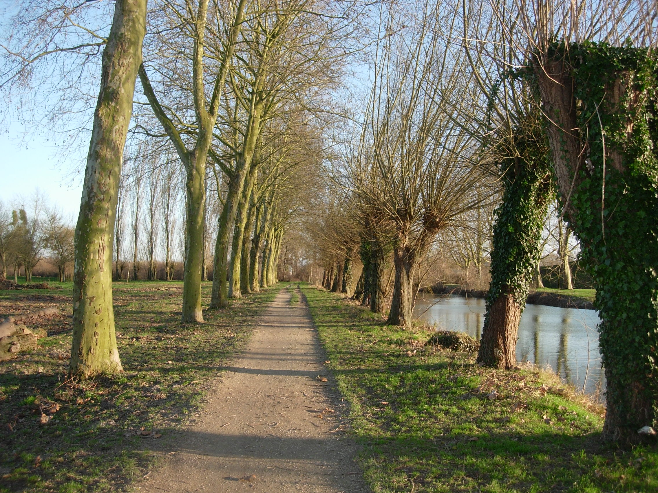 Romilly-sur-Seine (Aube, France) : parc de la Béchère